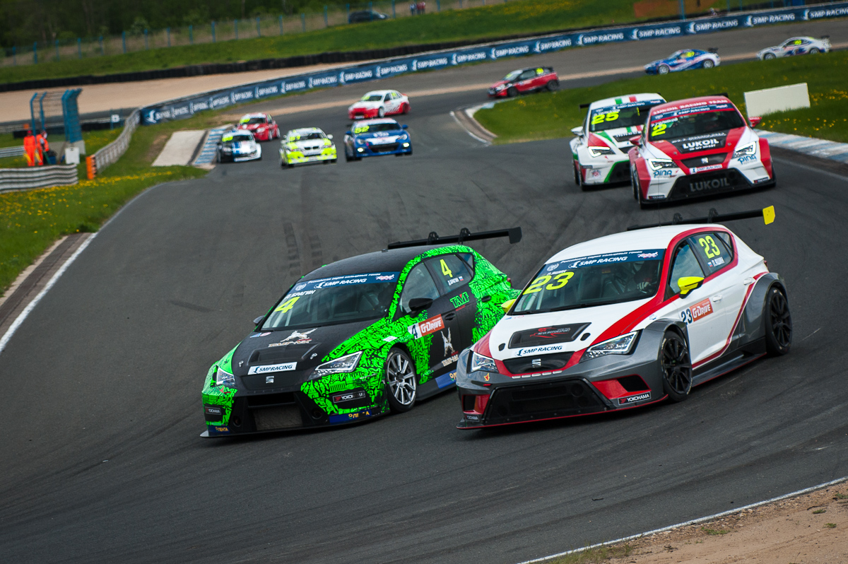 1 этап СМП РСКГ 2016, Смоленское кольцо